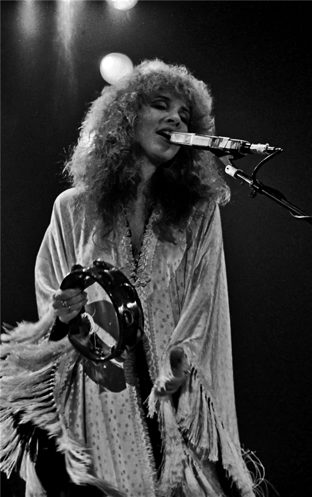 Stevie Nicks (Fleetwood Mac) en concert à Zürich en 1980.